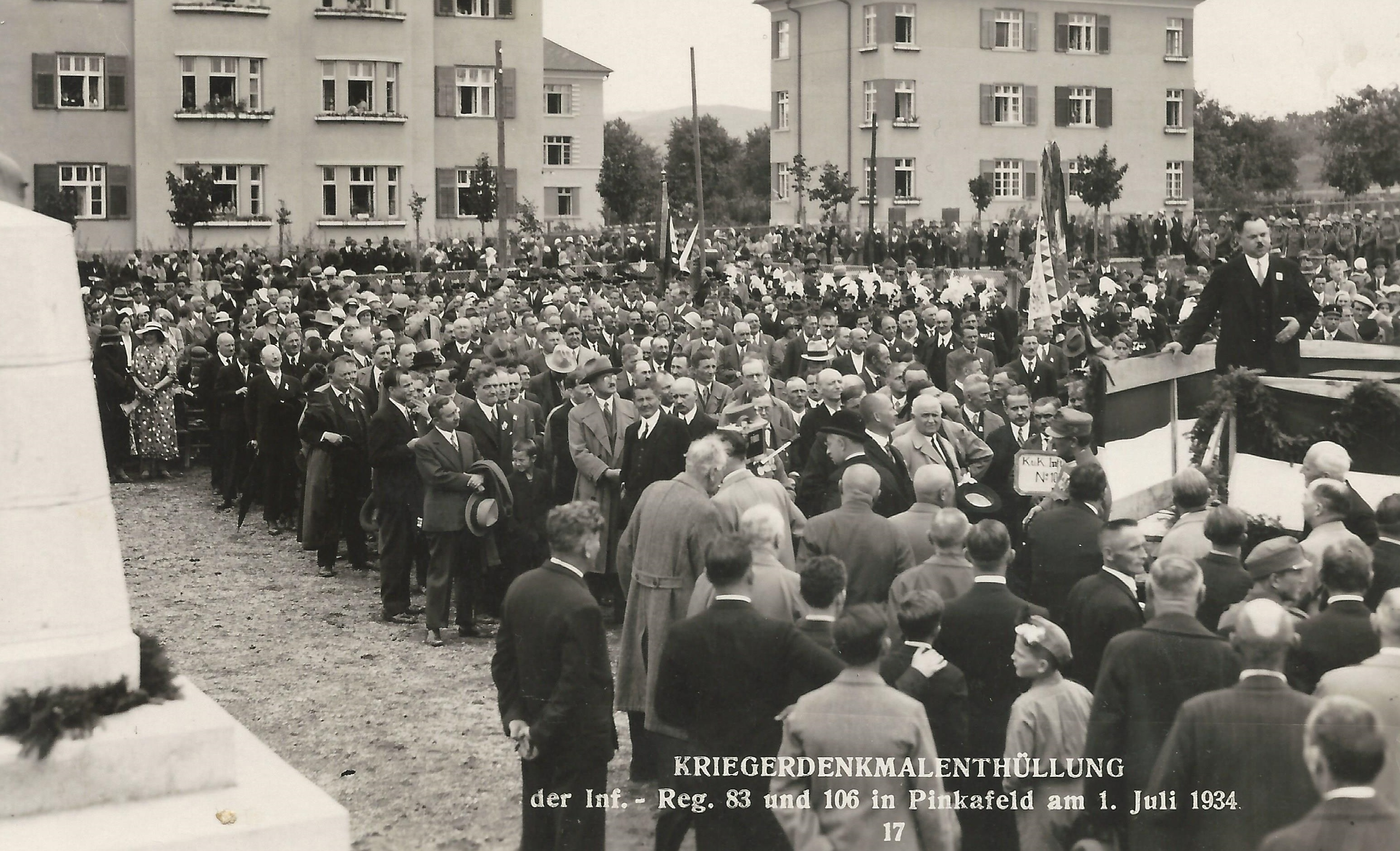 Enthüllung des Denkmales für die im 1. Weltkrieg gefallenen Angehörige der Infanterieregimenter 83 und 106